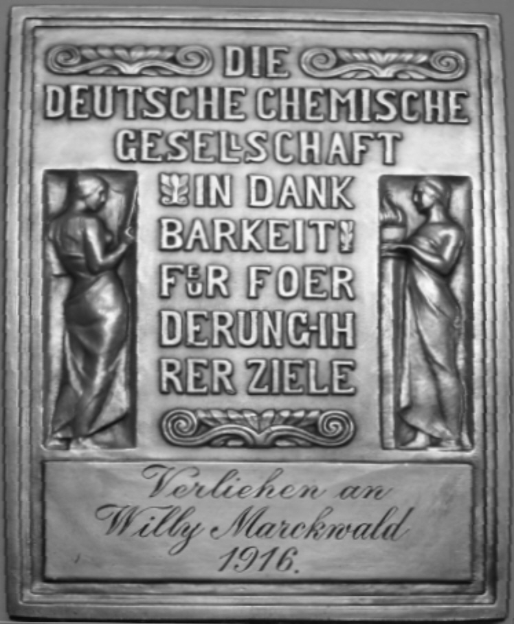 Auszeichnung der DChG 1916 für Prof. Willy Marckwald